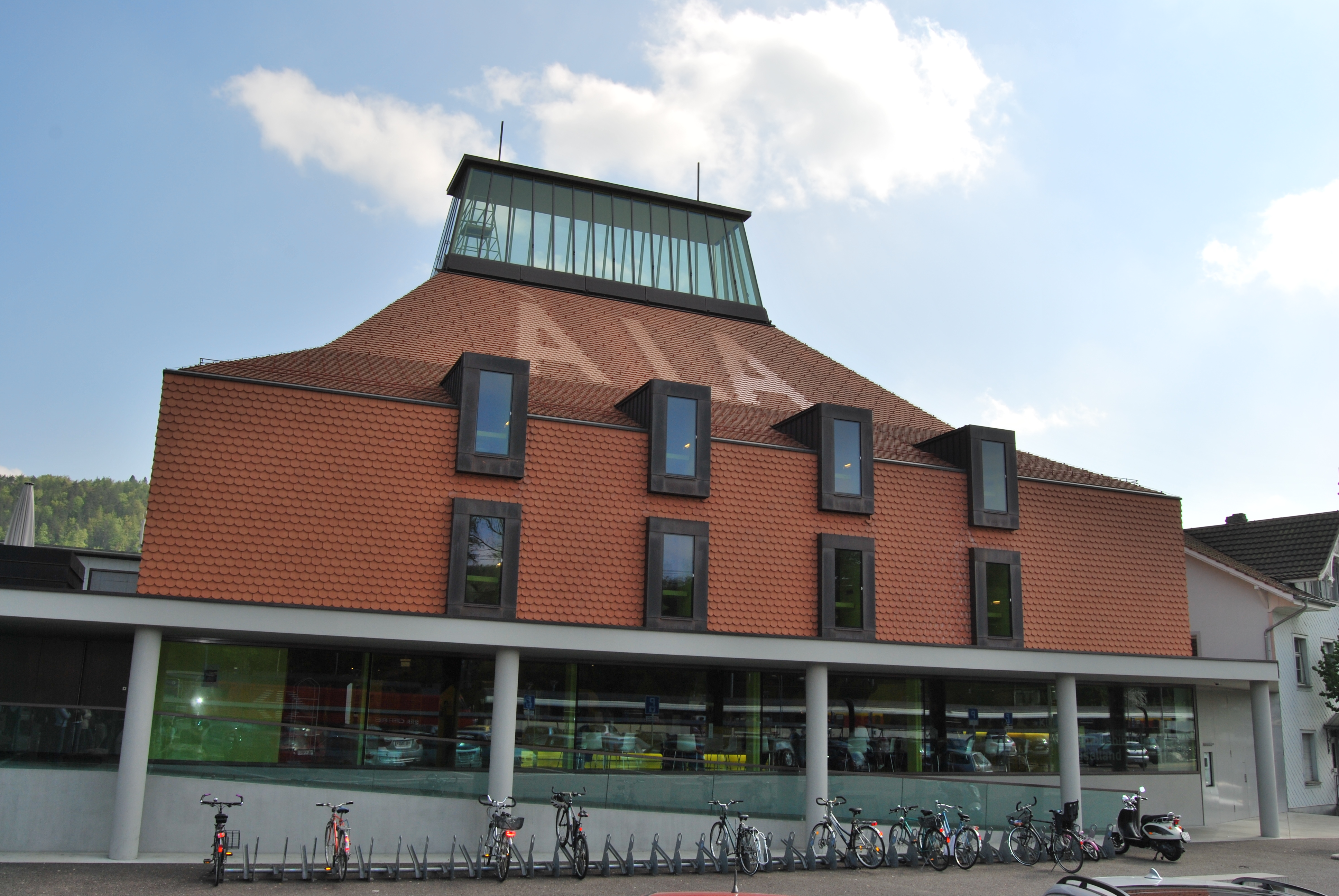 Kantonsbibliothek Baselland in Liestal